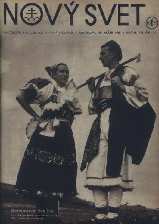 Titulný list týždenníka Nový svet, ktorý vychádzal na Slovensku počas 2 sv. vojny.